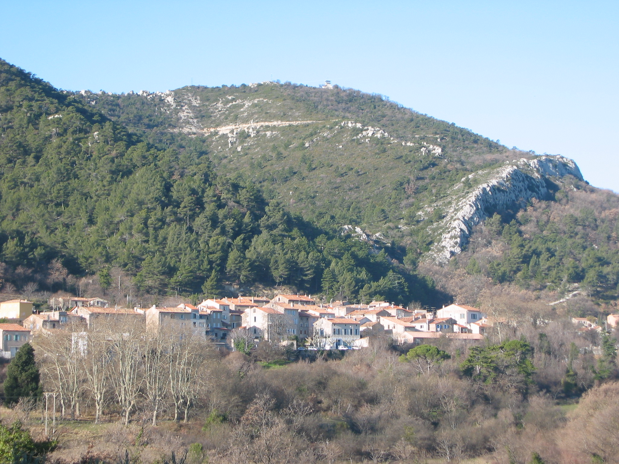 Le Village de Saint-Savournin (France, Bouches-du-Rhône, 13) Photo prise le 2 février 2005, depuis la route de La Valentine (près de la bifurcation du Collet Blanc) Photographe : Ludovic Ruat